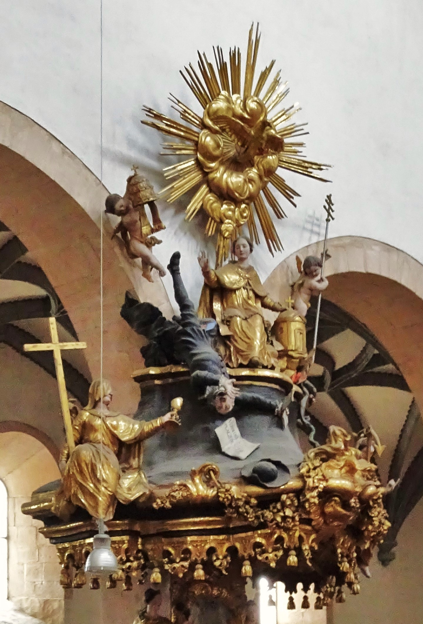 Dom zu Gurk, auf dem Schalldeckel der Kanzel ist der Triumph der Kirche über den Protestantismus dargestellt